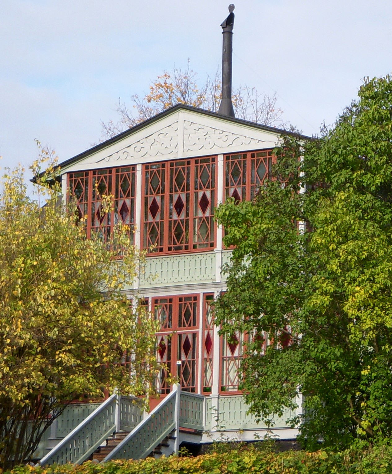 Törnerska villan i Stockholm, glasverandan